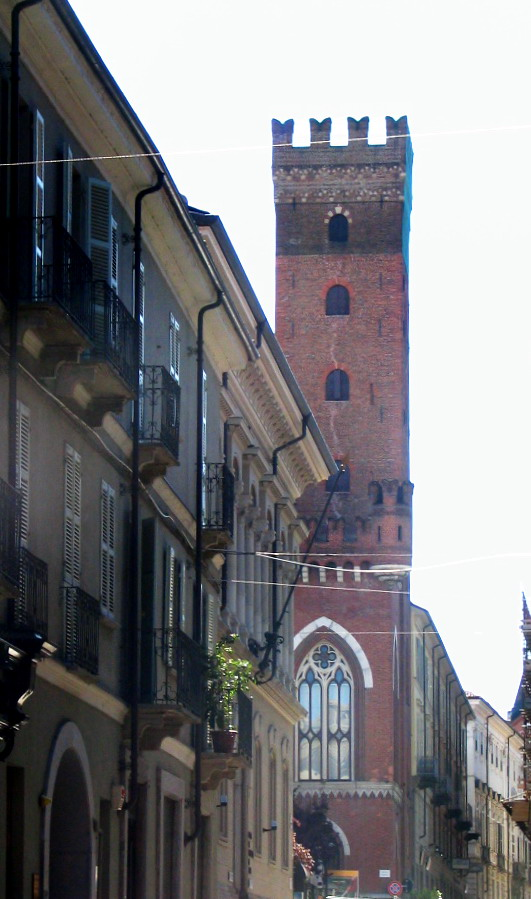 Asti, Torre Comentina, foto fatta da me Faberh 2006..